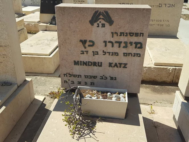 קברו של מנדרו כץ בבית העלמין הישן בהרצליה צילום אלי אלון